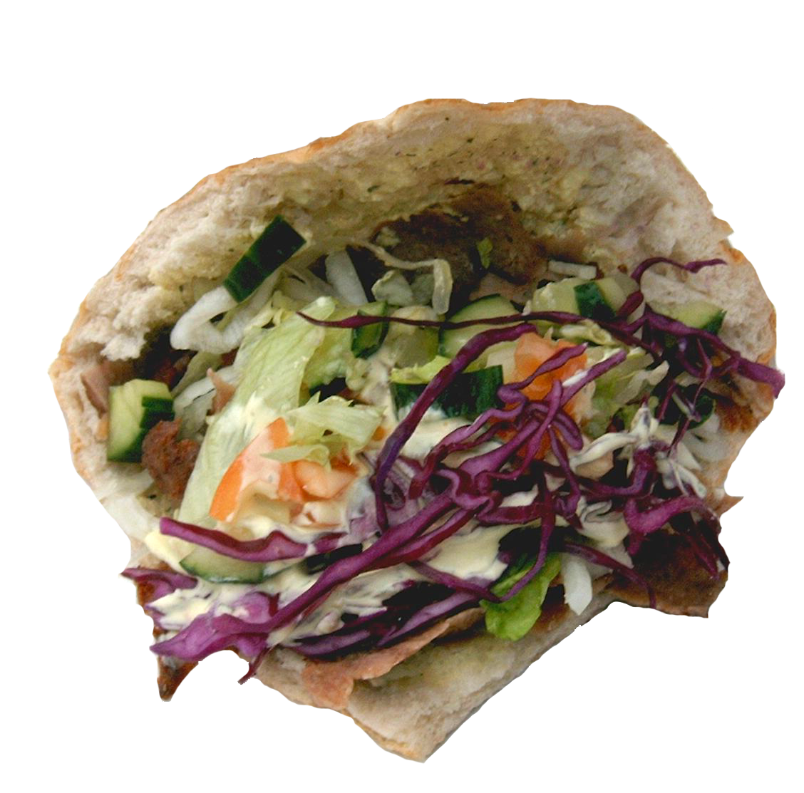 Another Döner kebab